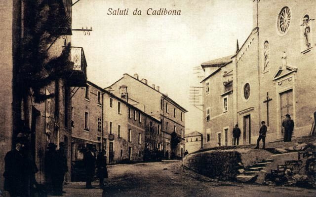 Panorama di fine Ottocento e inizio Novecento della frazione di Cadibona, Quiliano, Liguria, Italia